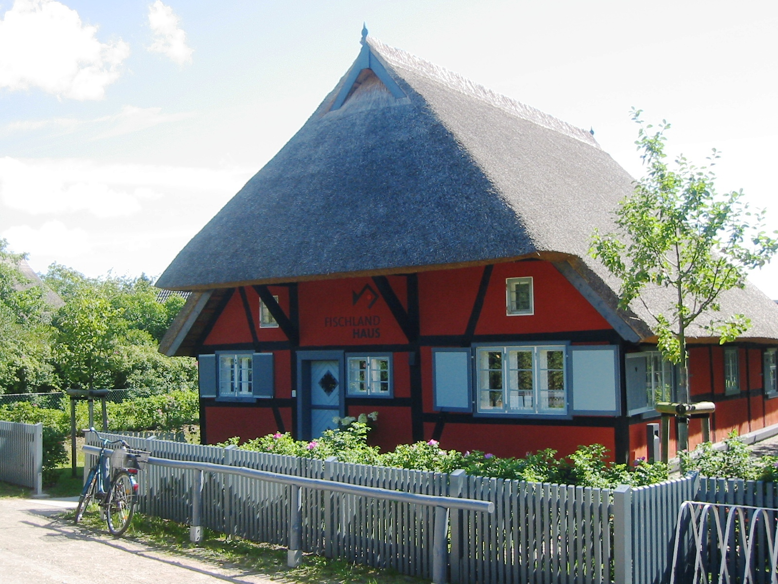 Fischlandhaus in Wustrow (Fischland). Es gilt als eines der ältesten Häuser der Gemeinde.